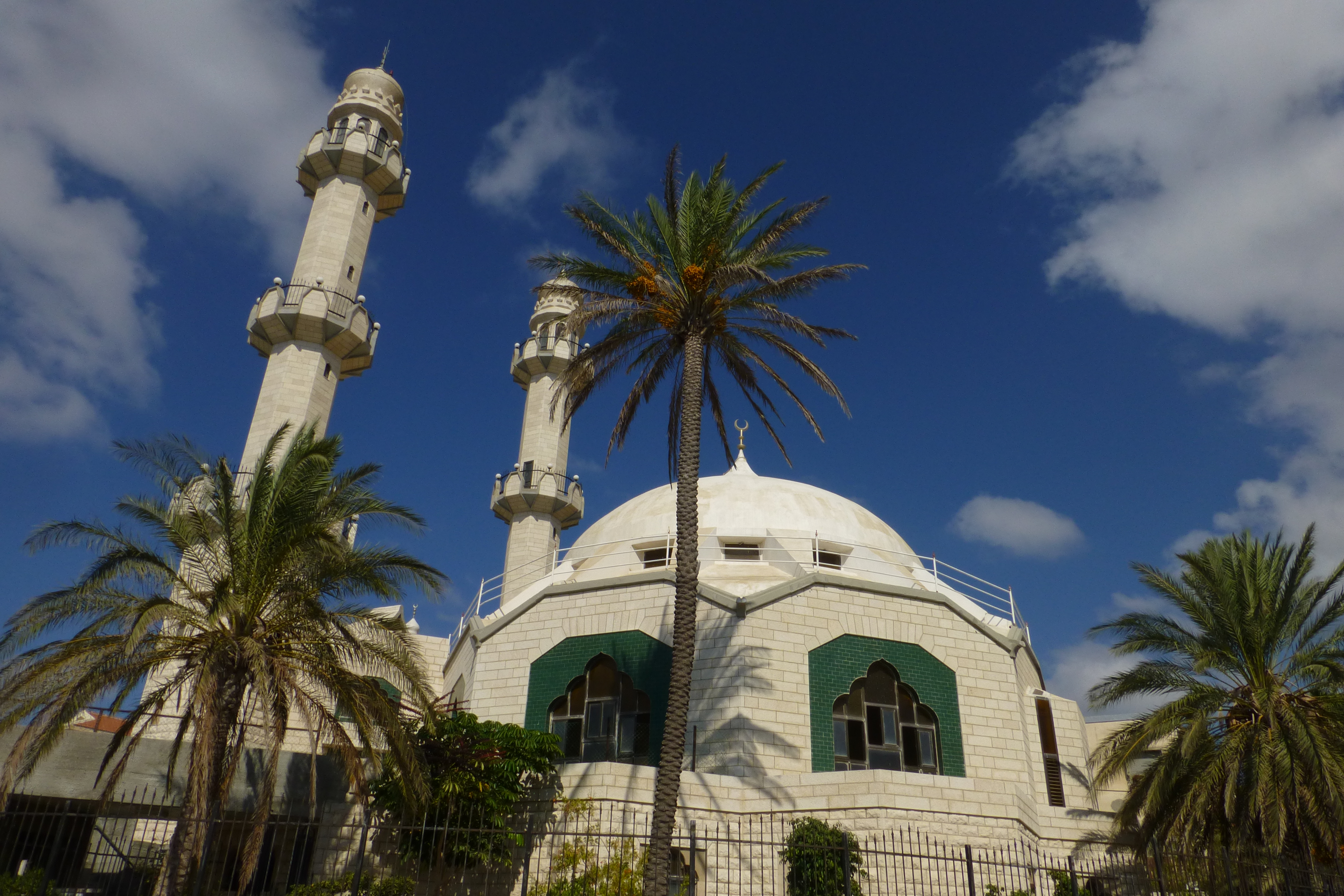 מסגד סיידנא מחמוד בשכונת כבביר בחיפה. מסגד זה משתייך לפלג האחמדים שנוסד בהודו ומטיף לנאורות, שלום ואהבה לאחר.